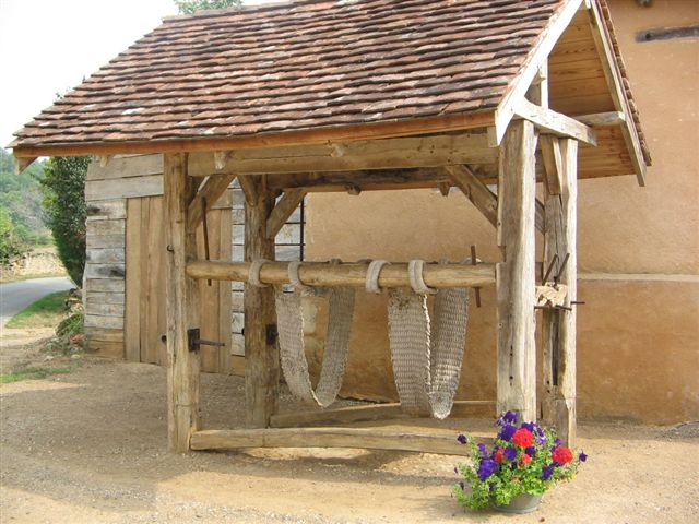 Tremail à Baran de Castels